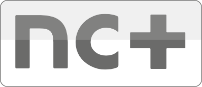 Logo platformy nc+ - wersja przezroczysta